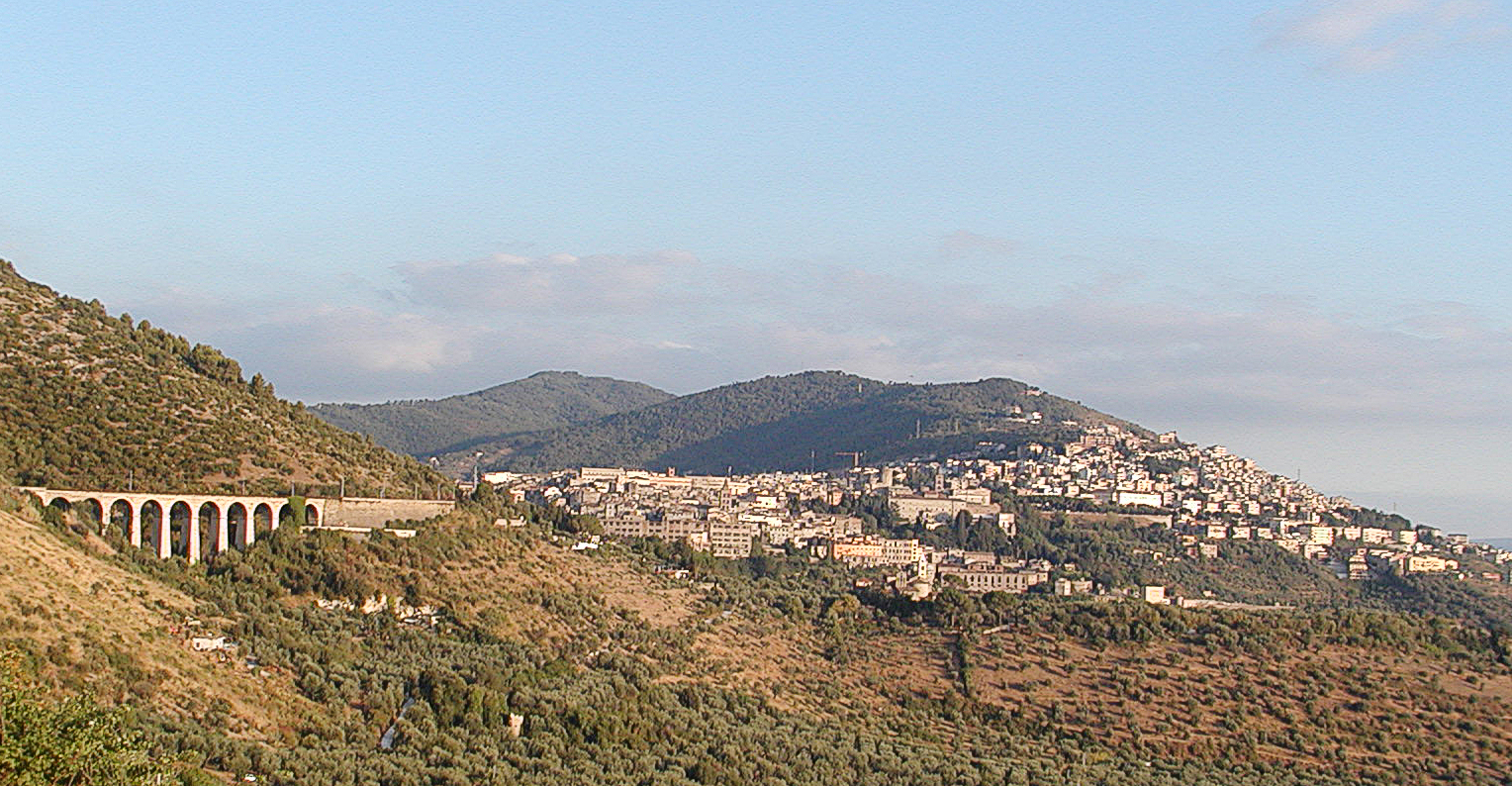 Tivoli